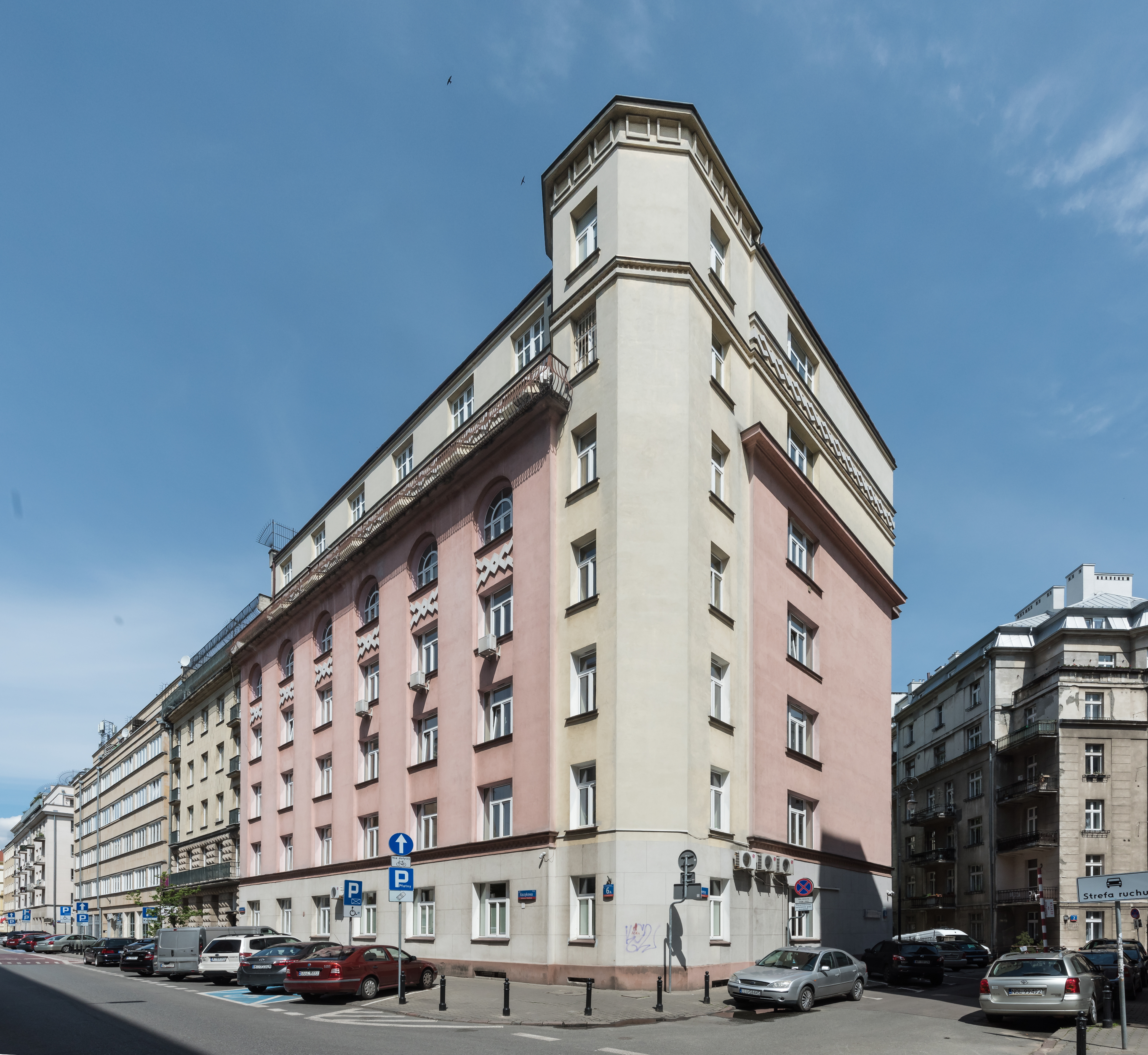 Budynek przy ul. Koszykowej 6a w Warszawie